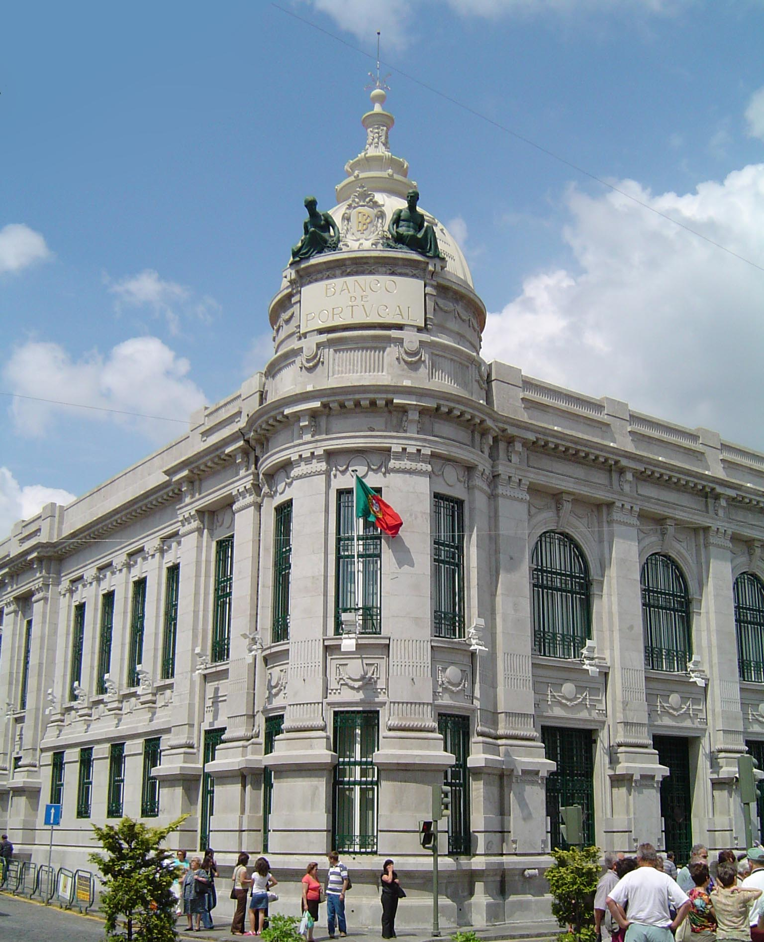 Edificio do Banco de Portugal em Braga.